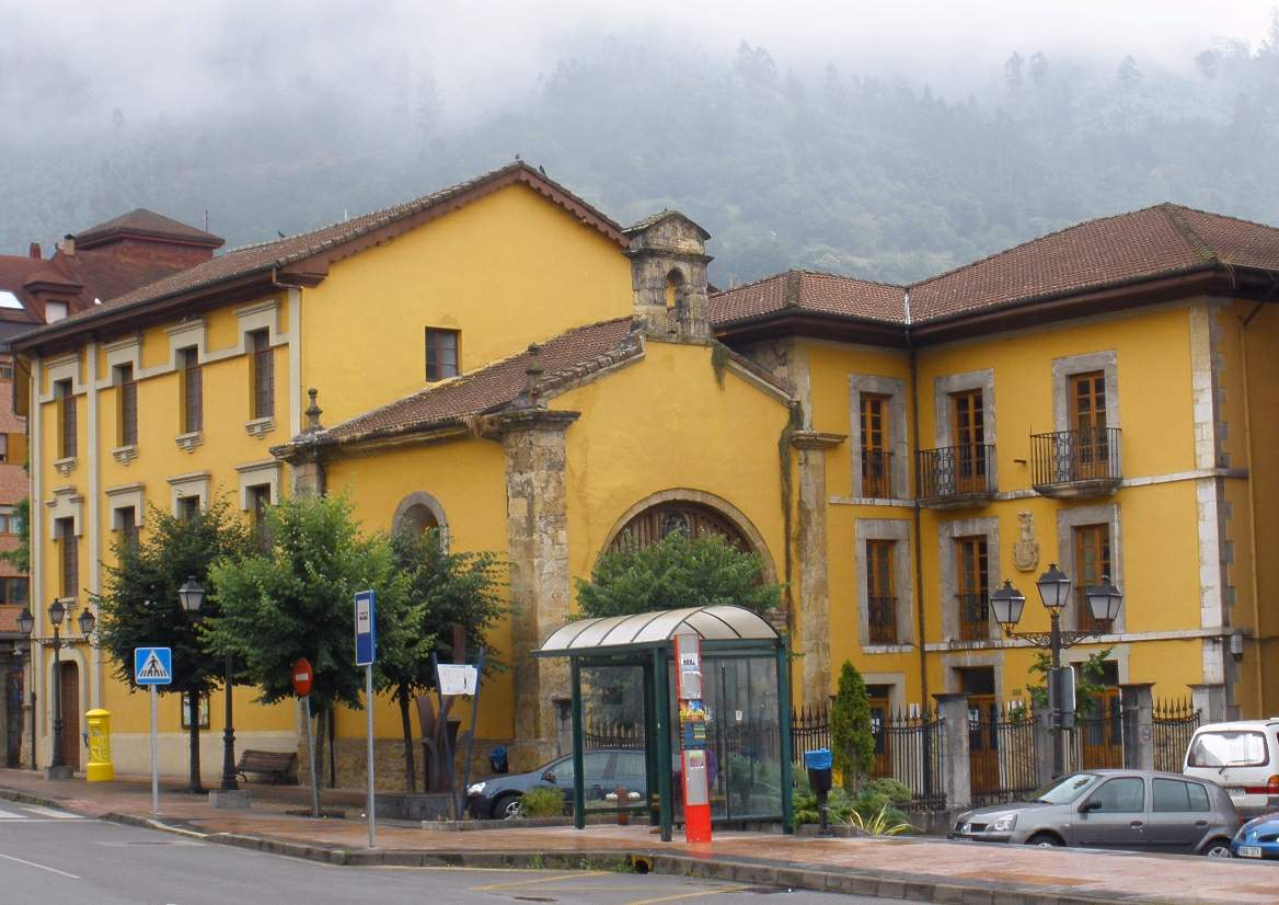 Casa Cobián (El Prial), en Infiesto (Piloña, Asturias)